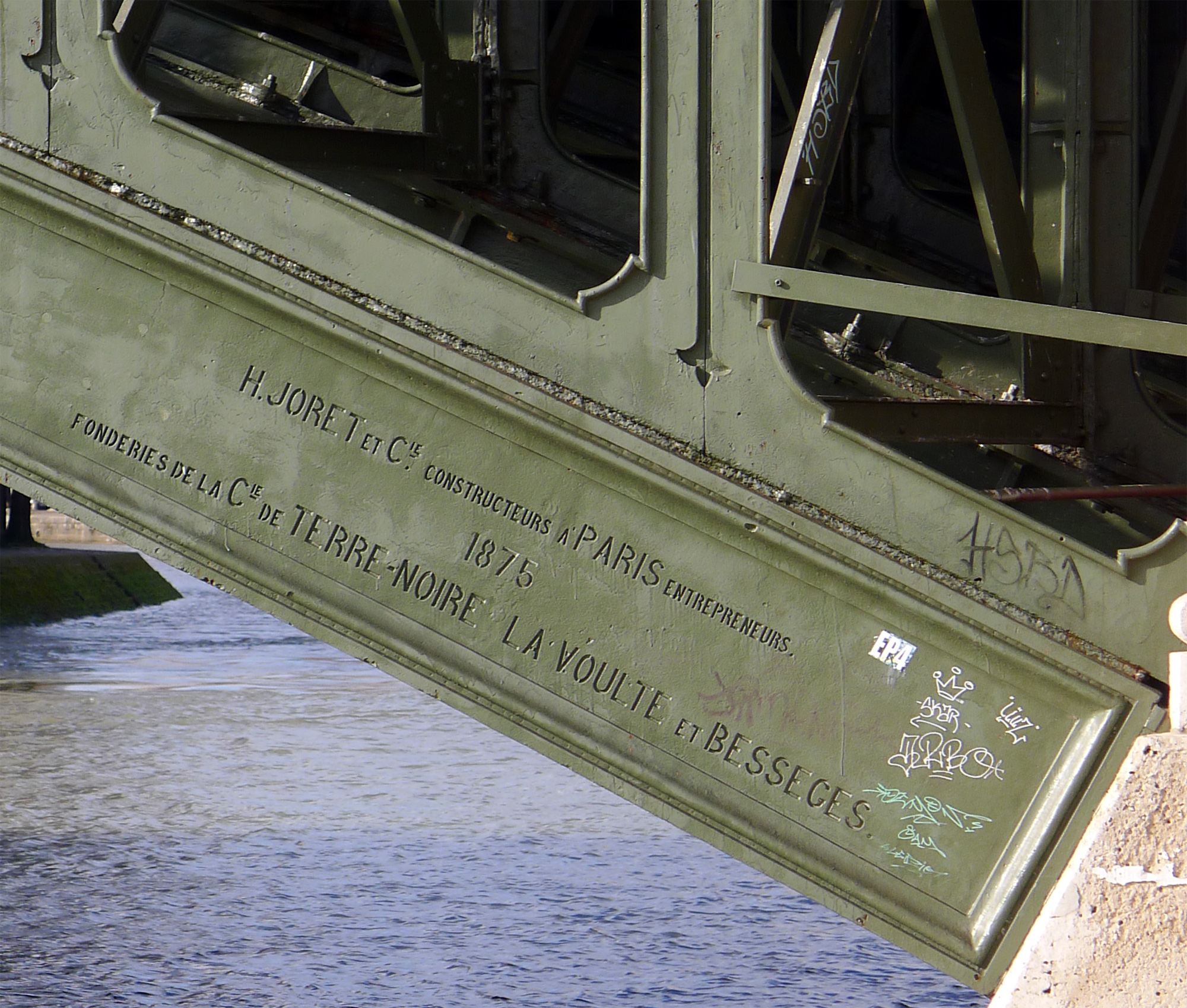 Pont de Sully (marques du fabriquant) - Paris IV